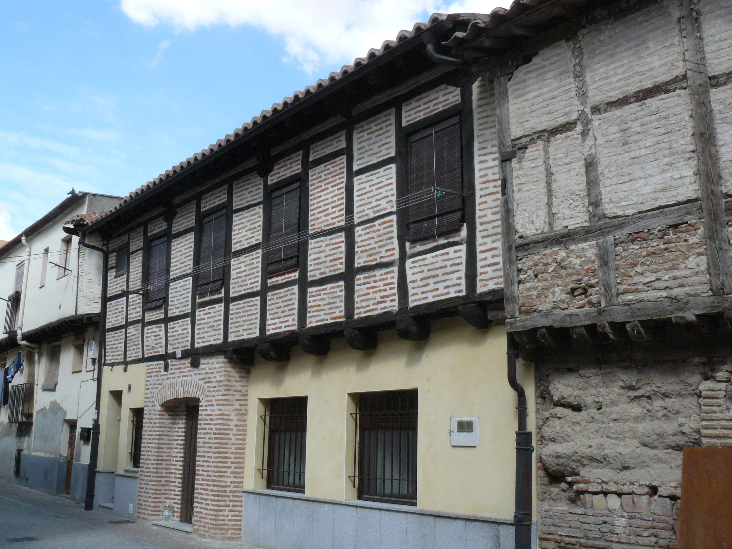 Construcción tradicional en Arévalo, provincia de Ávila.